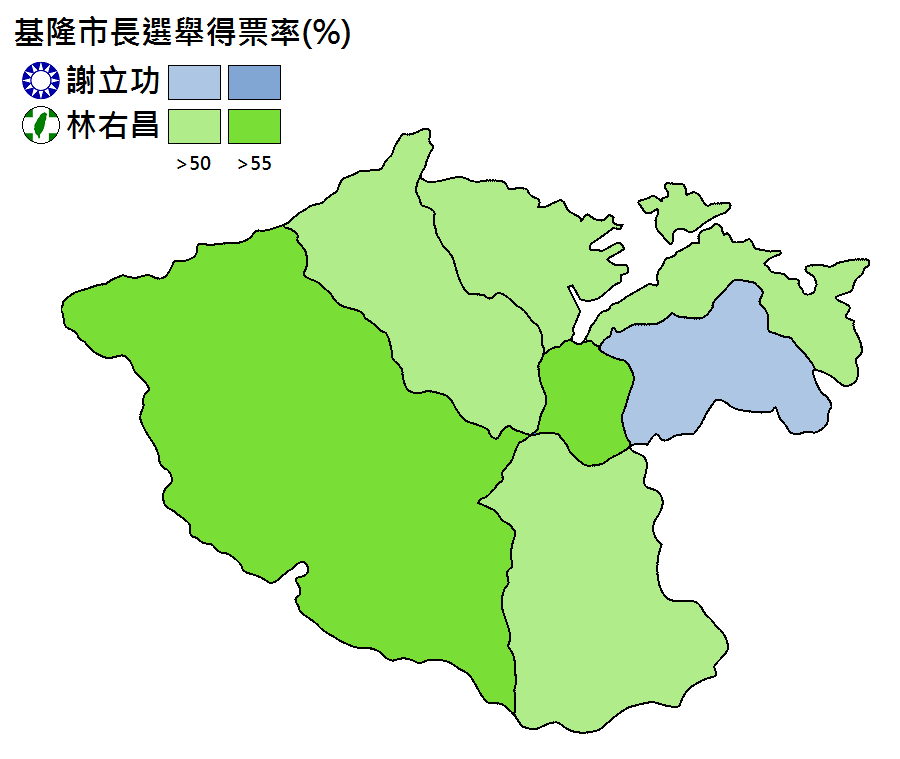 基隆市長選舉得票分布。